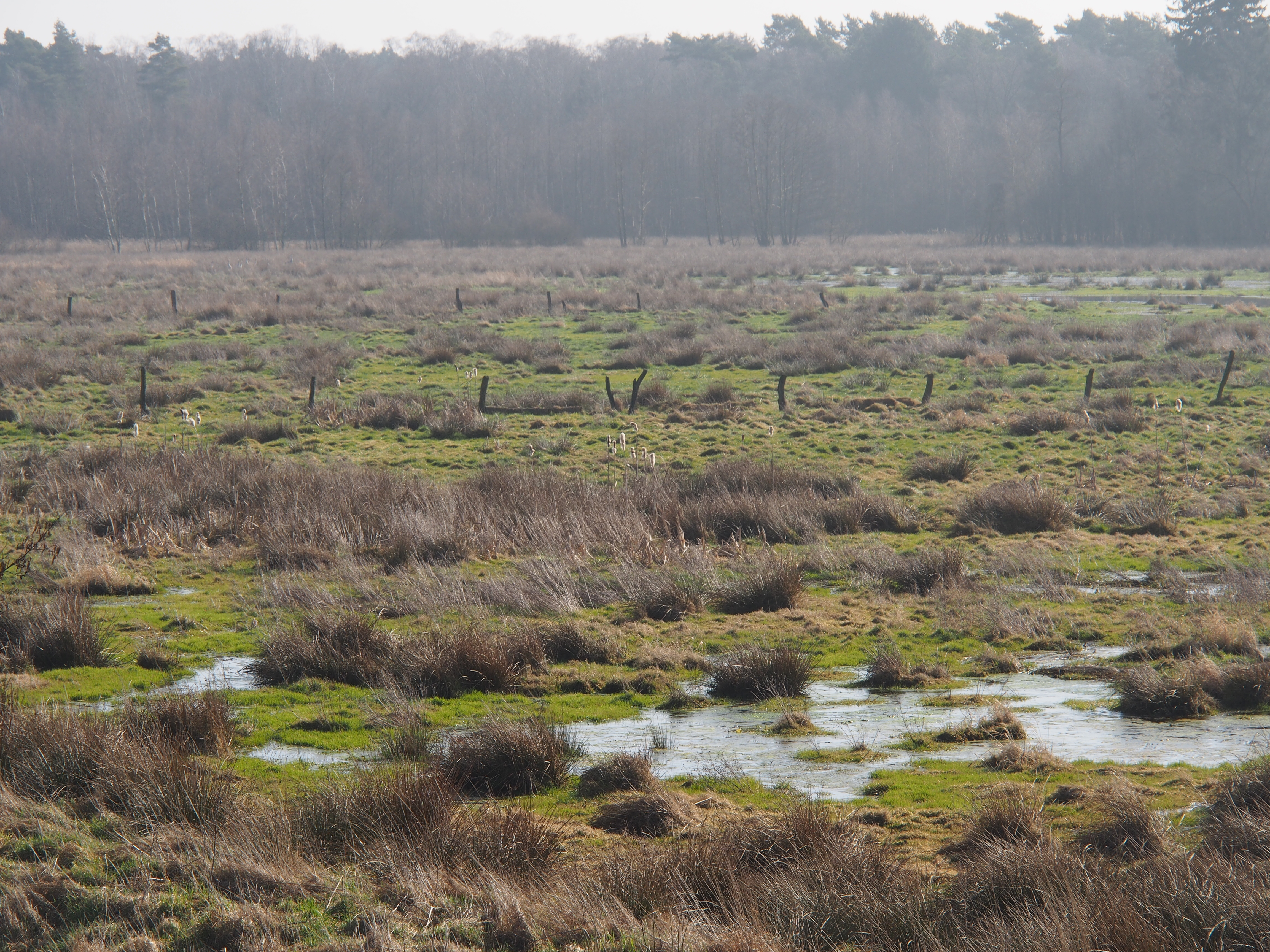 Postmoor (NSG Lutter) bei Bargfeld, Gemeinde Eldingen, Landkreis Celle